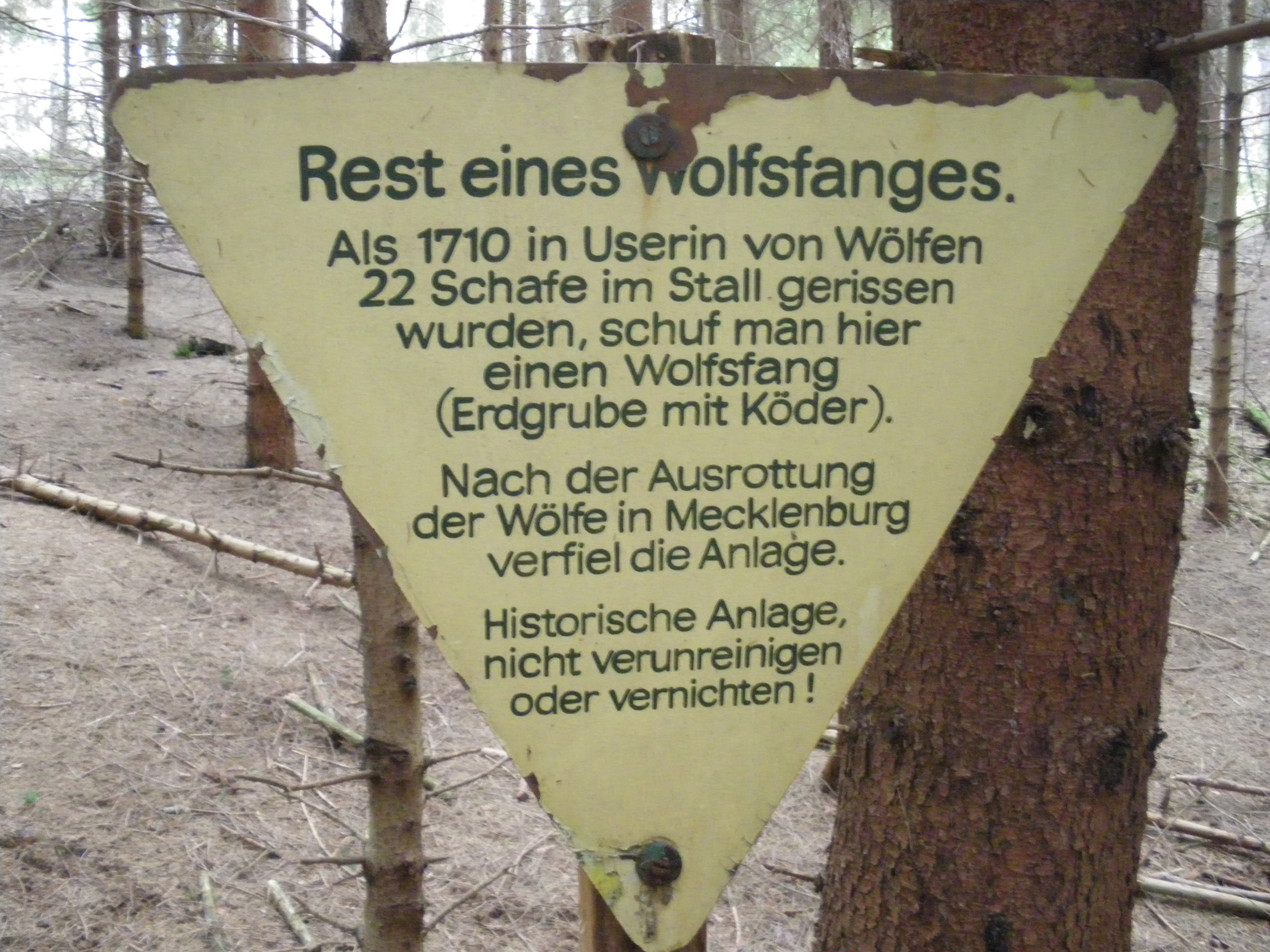 Schild am 1712 errichteten, später rekonstruierten Wolfsfang in der Nähe von Zwenzow (Mecklenburg-Vorpommern)